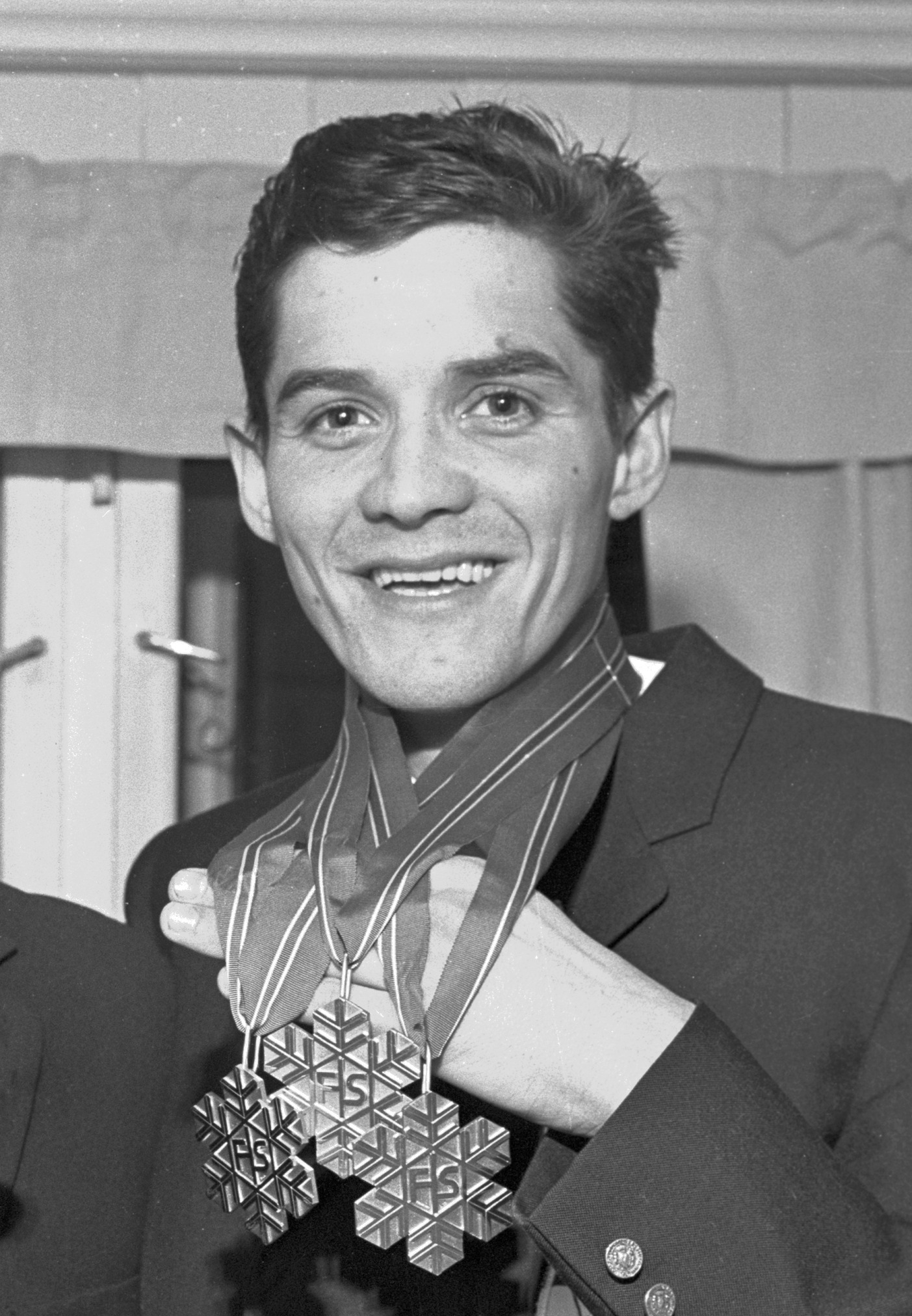 Gjermund Eggen, her med medaljene etter VM i Oslo, februar 1966.